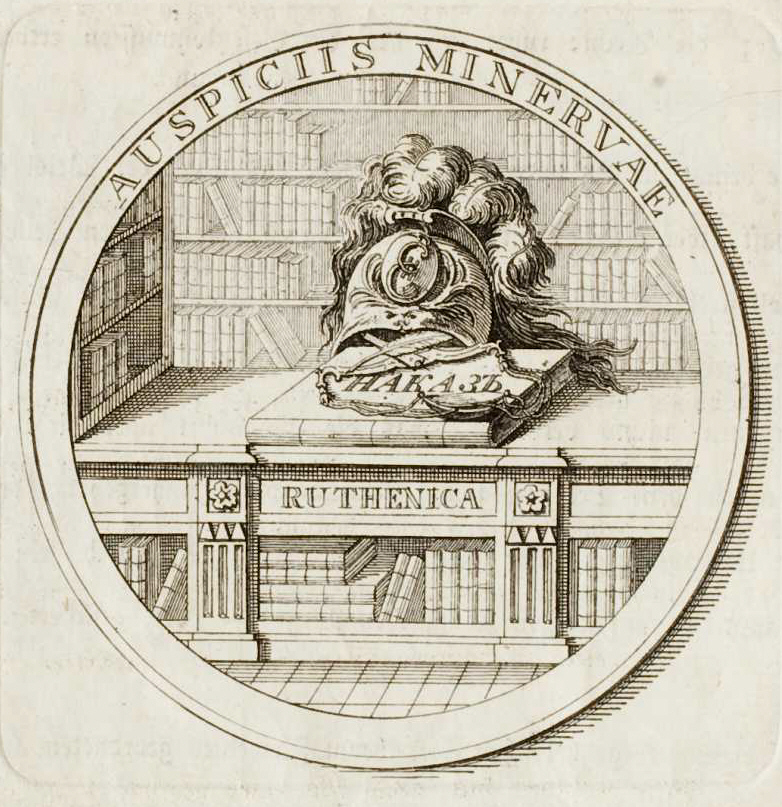 Illustration aus Die Bombe Peters des Grossen in der Stadtbibliothek von Riga : Denkschrift. Statt einer Beschreibung der wiederzueröffnenden Stadtbibliothek von Johann Christoph Berens, Mitau : Steffenhagen, 1787